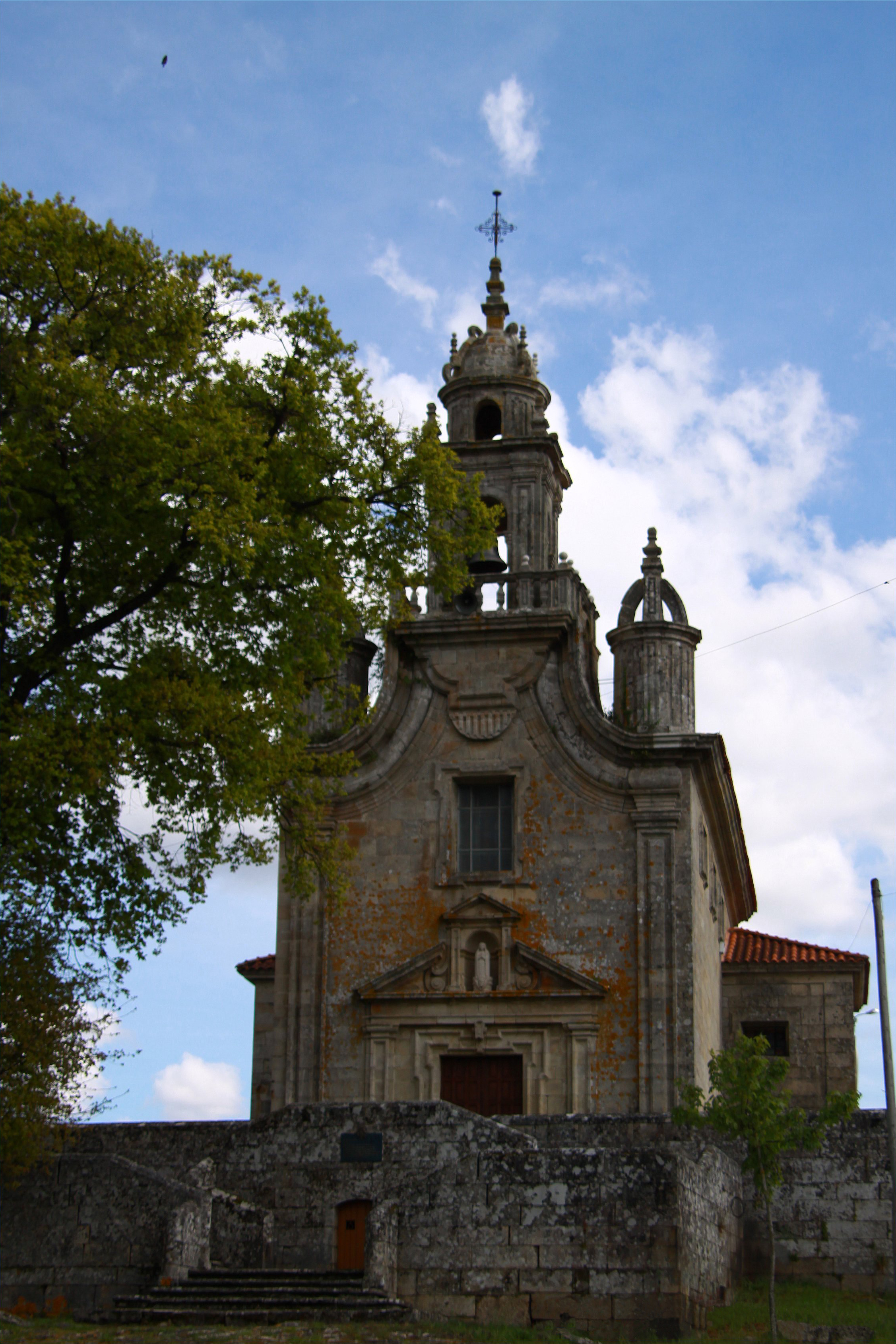 Santuario de Nosa Señora do Cristal, Vilanova dos Infantes